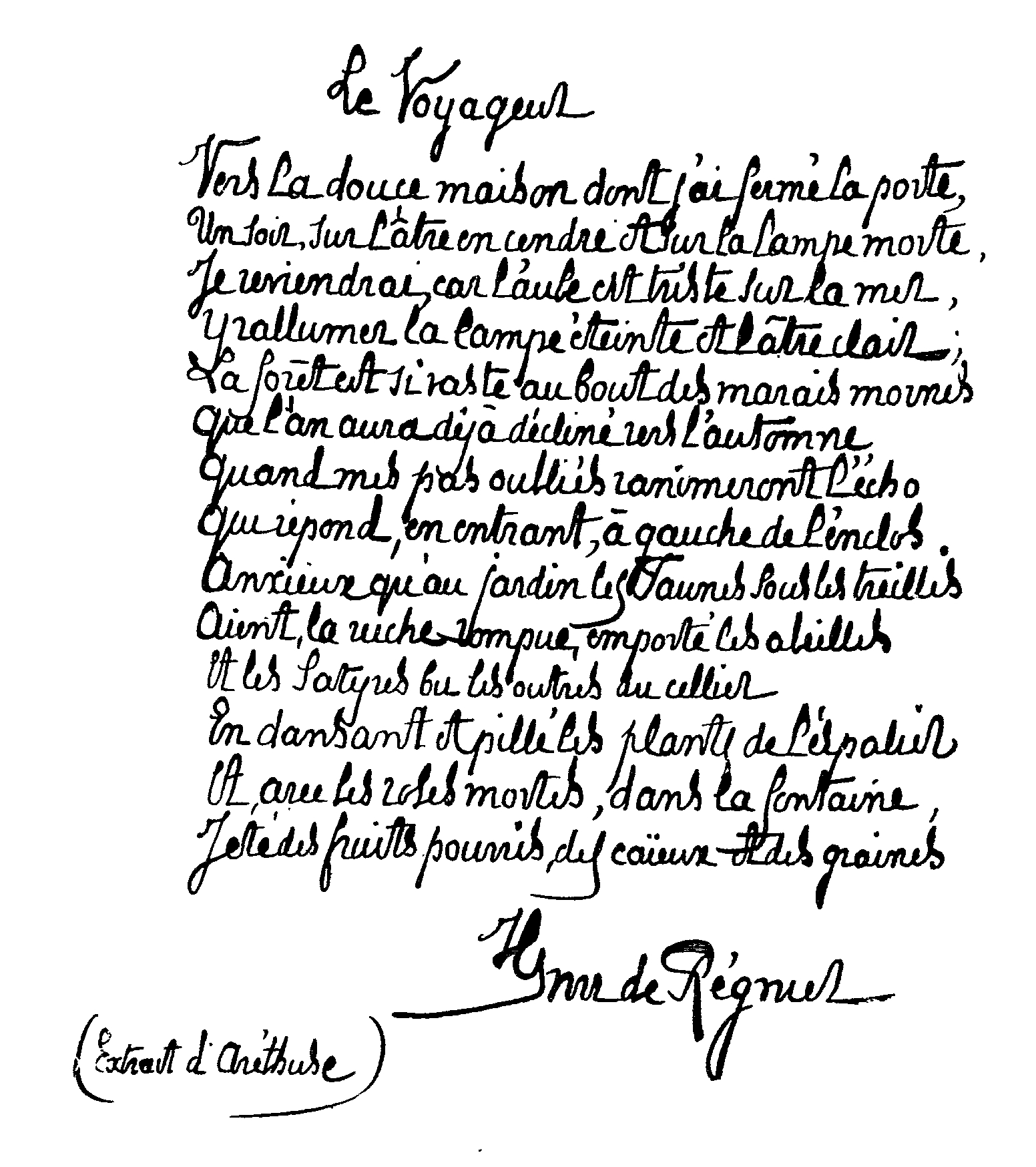 Le Voyageur. Poème autographe de Henri de Régnier (1864-1836). Extrait d'Aréthuse publié en 1895.